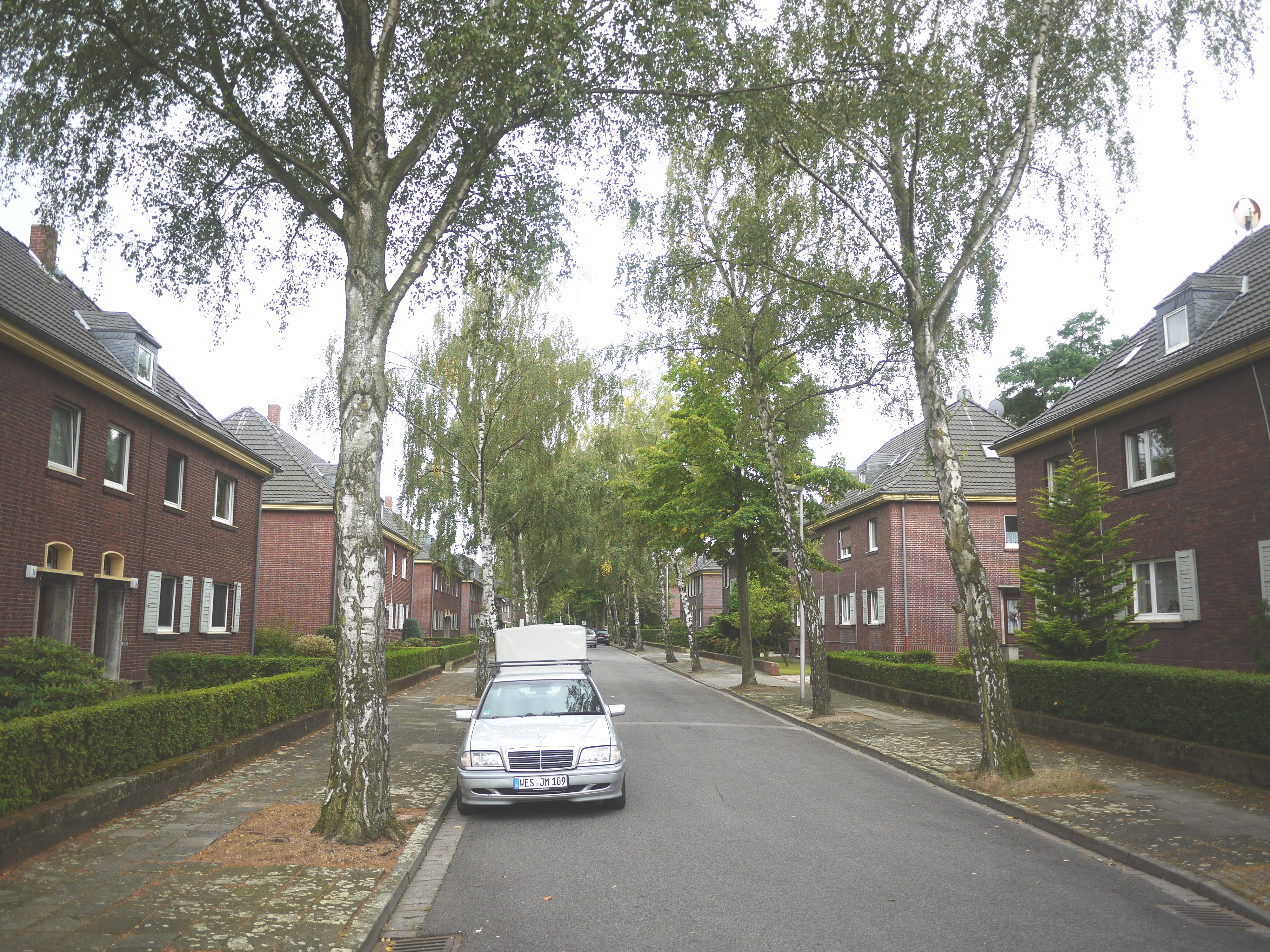 Muspasch Siedlung in Moers (denkmalgeschützt), Oststraße